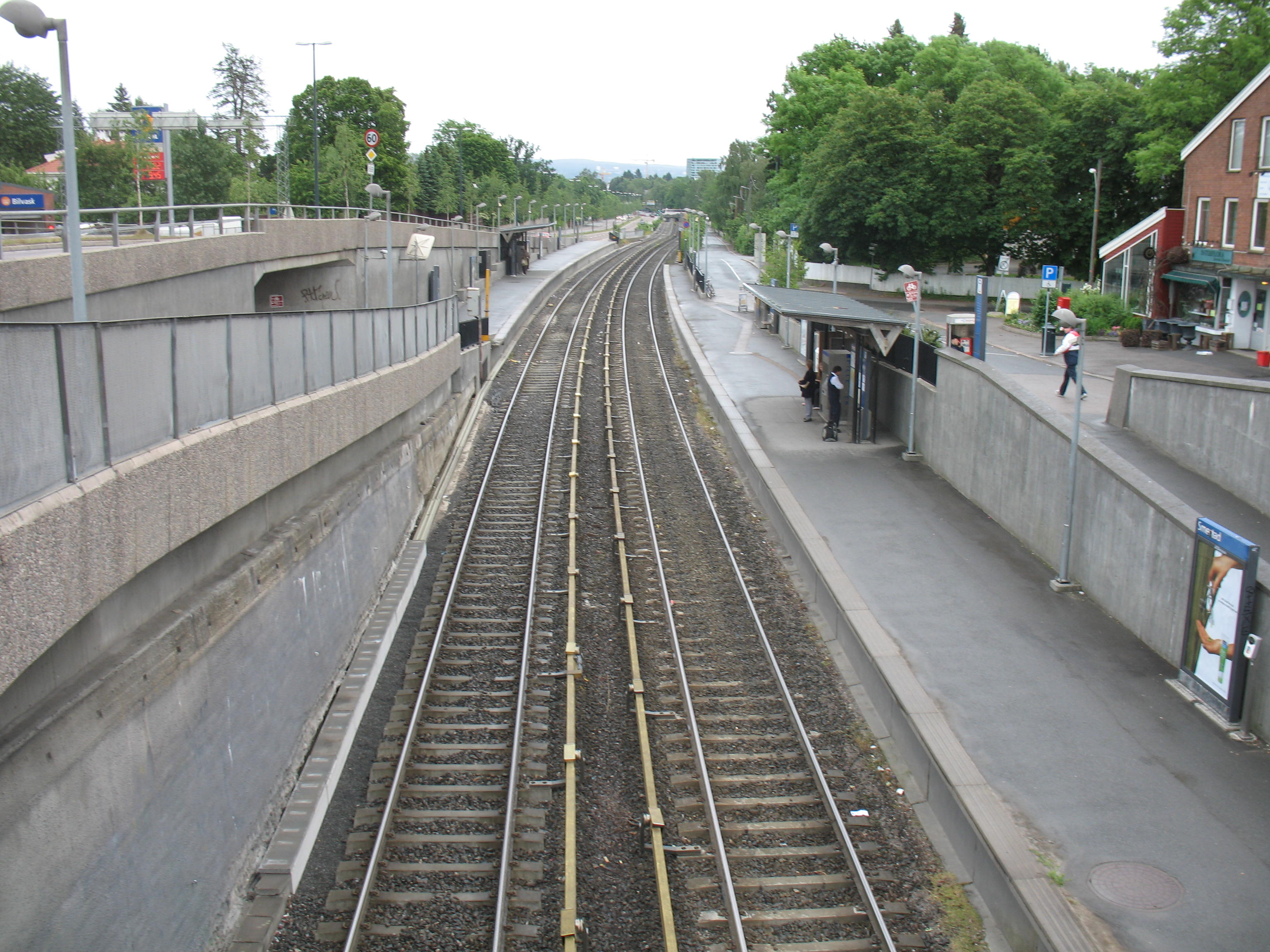 Smedstad, en T-banestasjon i Oslo